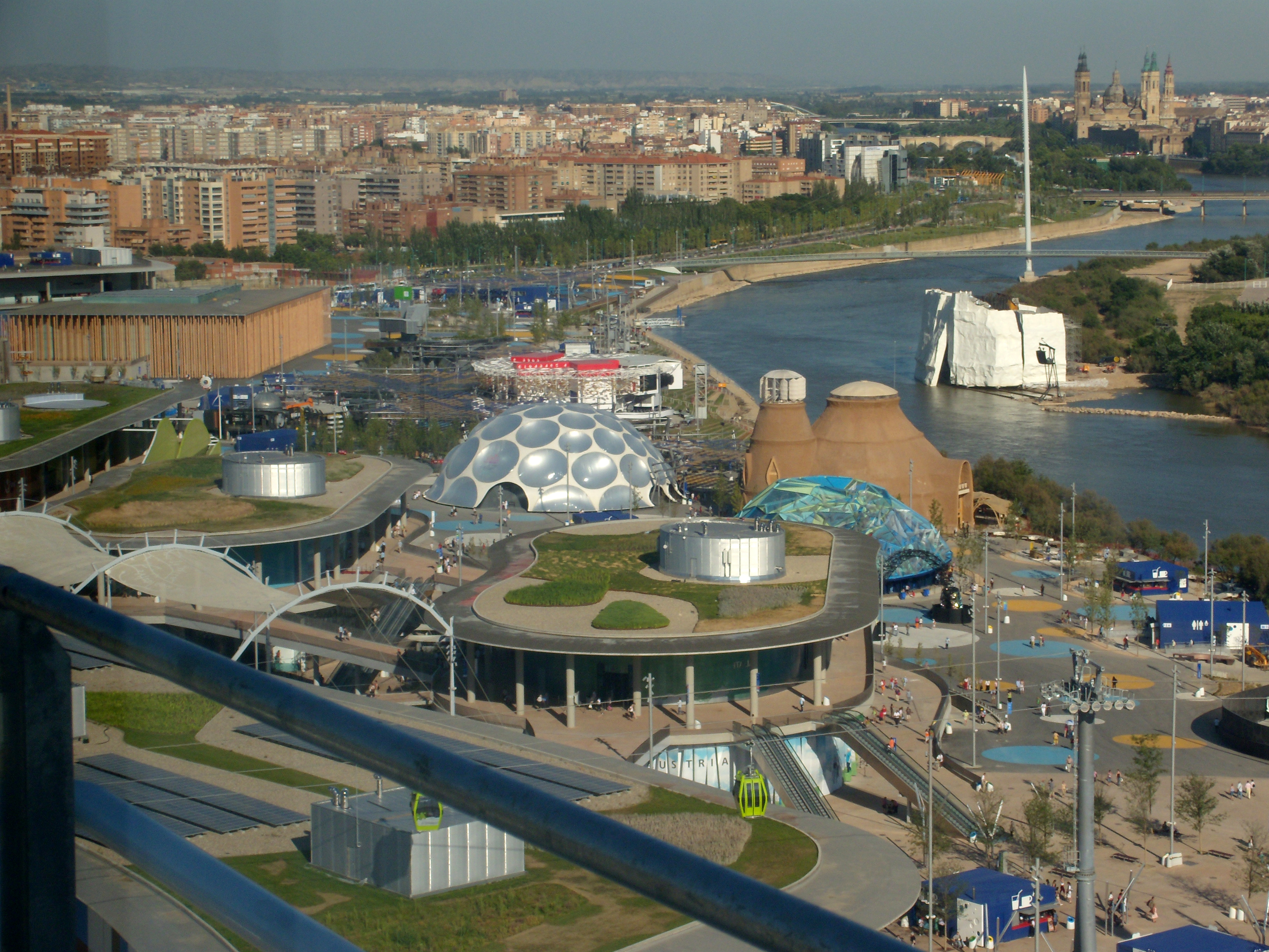 Expo Zaragoza 2008, visto de la Torre del Agua